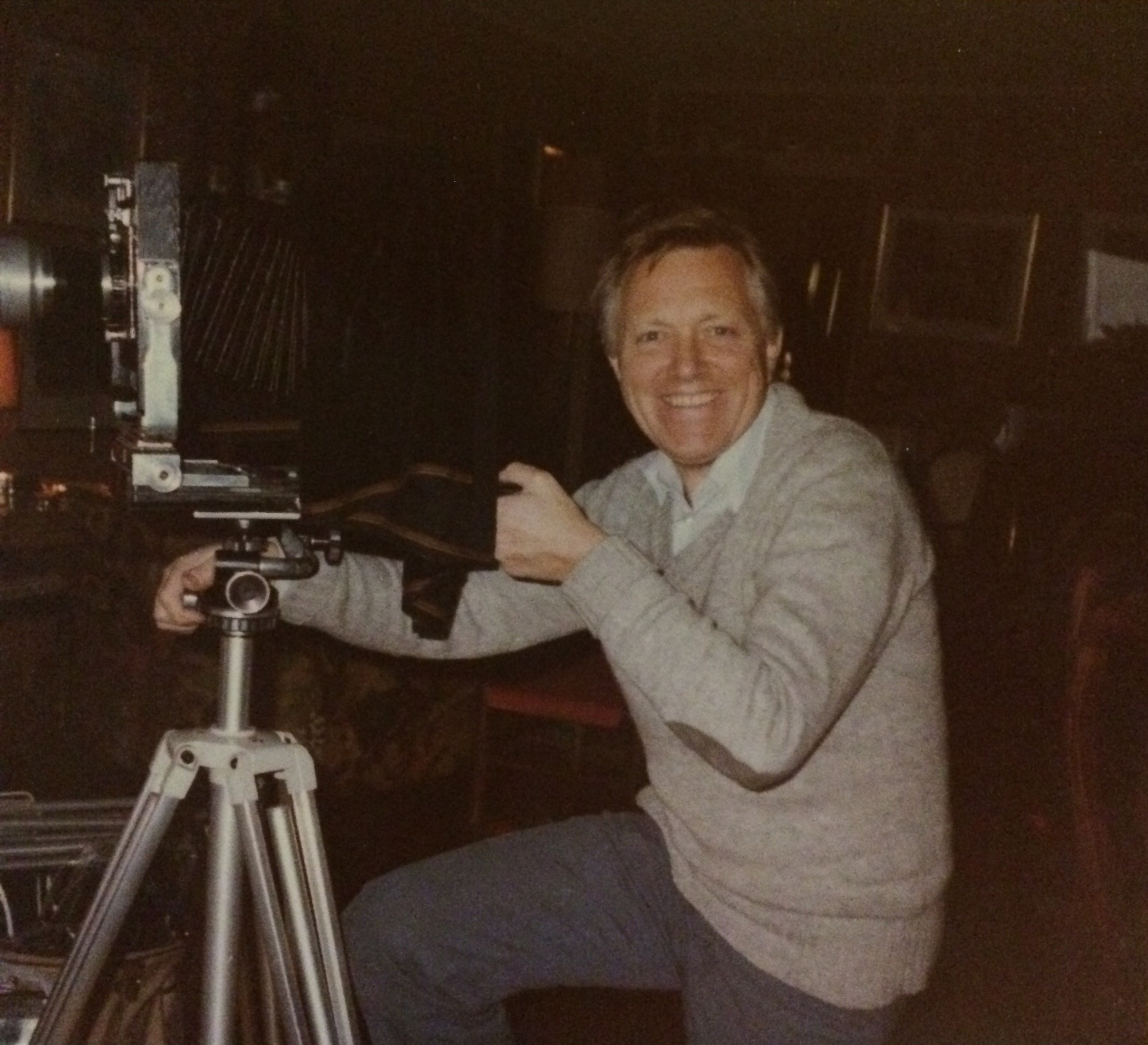 Fotograf Per Petersson i sitt arbeid med å avfotografere norsk billedkunst.